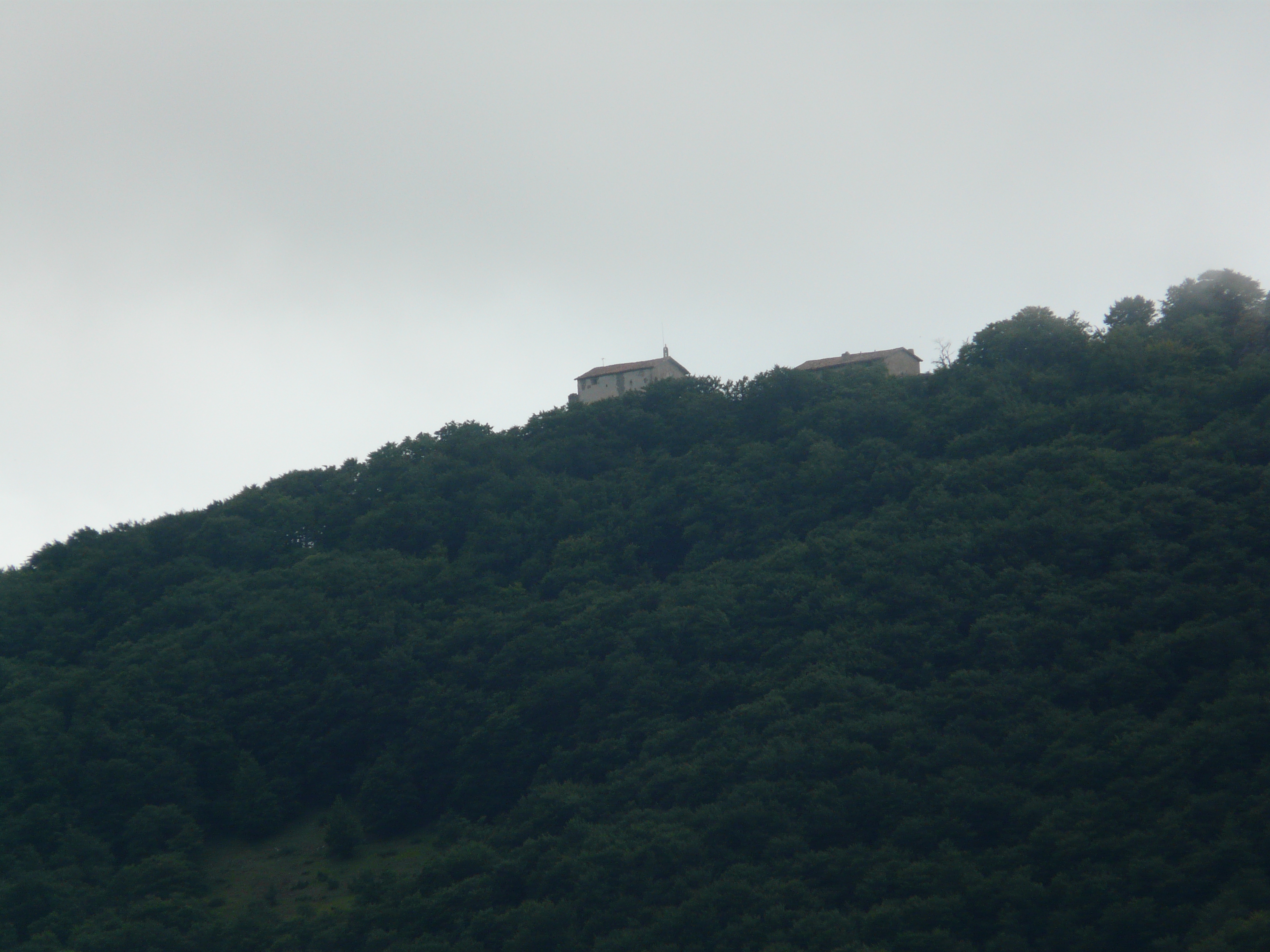 Ermita de la Trinitat d'Erga vista des de Zarrantz.